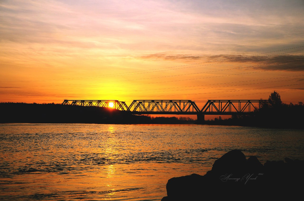 ЖД Мост в г.Канске